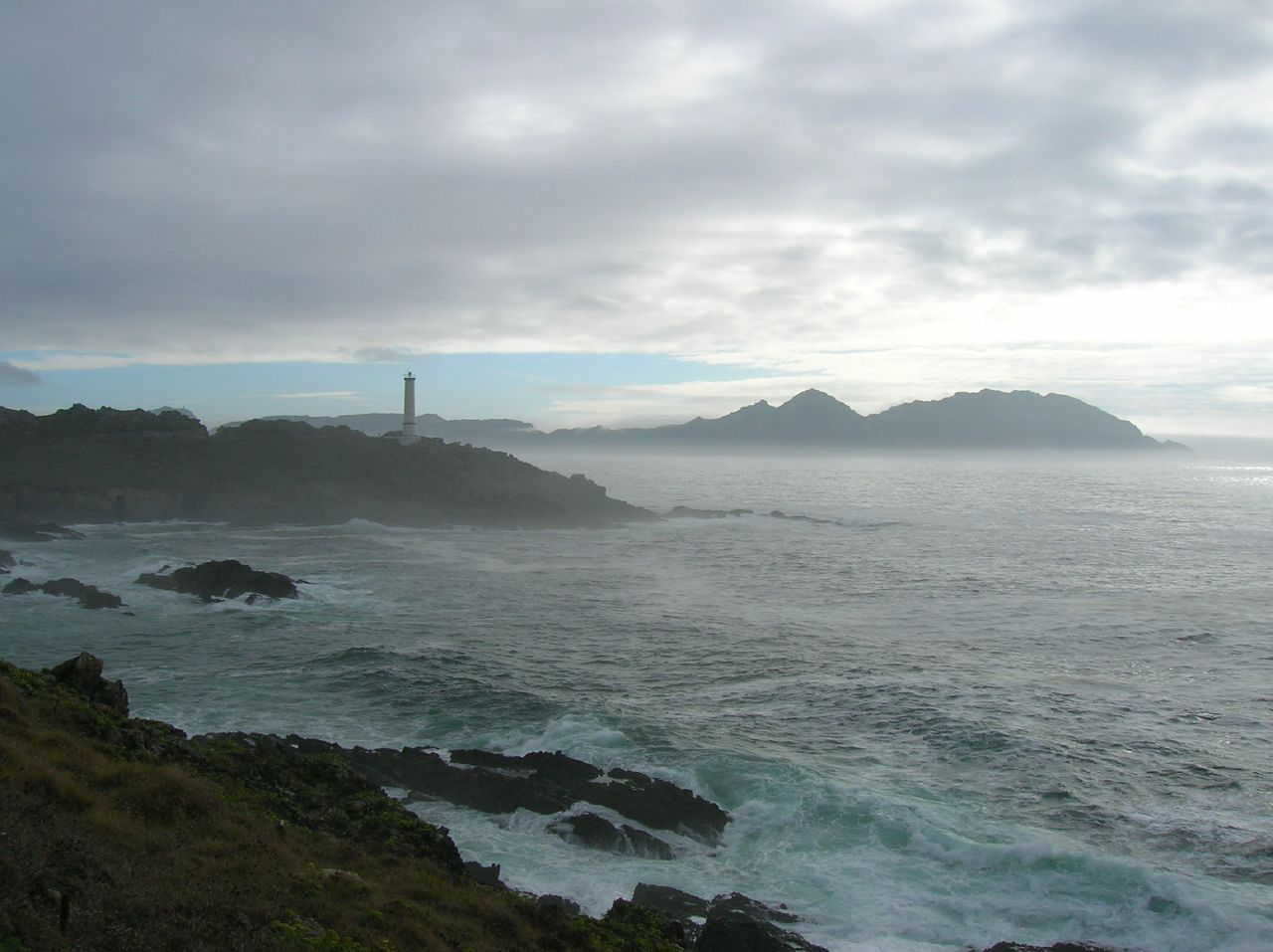 Cabo Home y las Islas Cíes vistas desde la Costa da Vela.